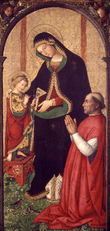 La obra, que es conocida como la Virgen de las Fiebres, representa a la Virgen María, que aparece sentada, junto al Niño Jesús, que se halla de pie y a la derecha de su madre, al tiempo que aparece arrodillado ante ellos el cardenal Francisco de Borja (1441-1511), que no debe ser confundido con su pariente, San Francisco de Borja.